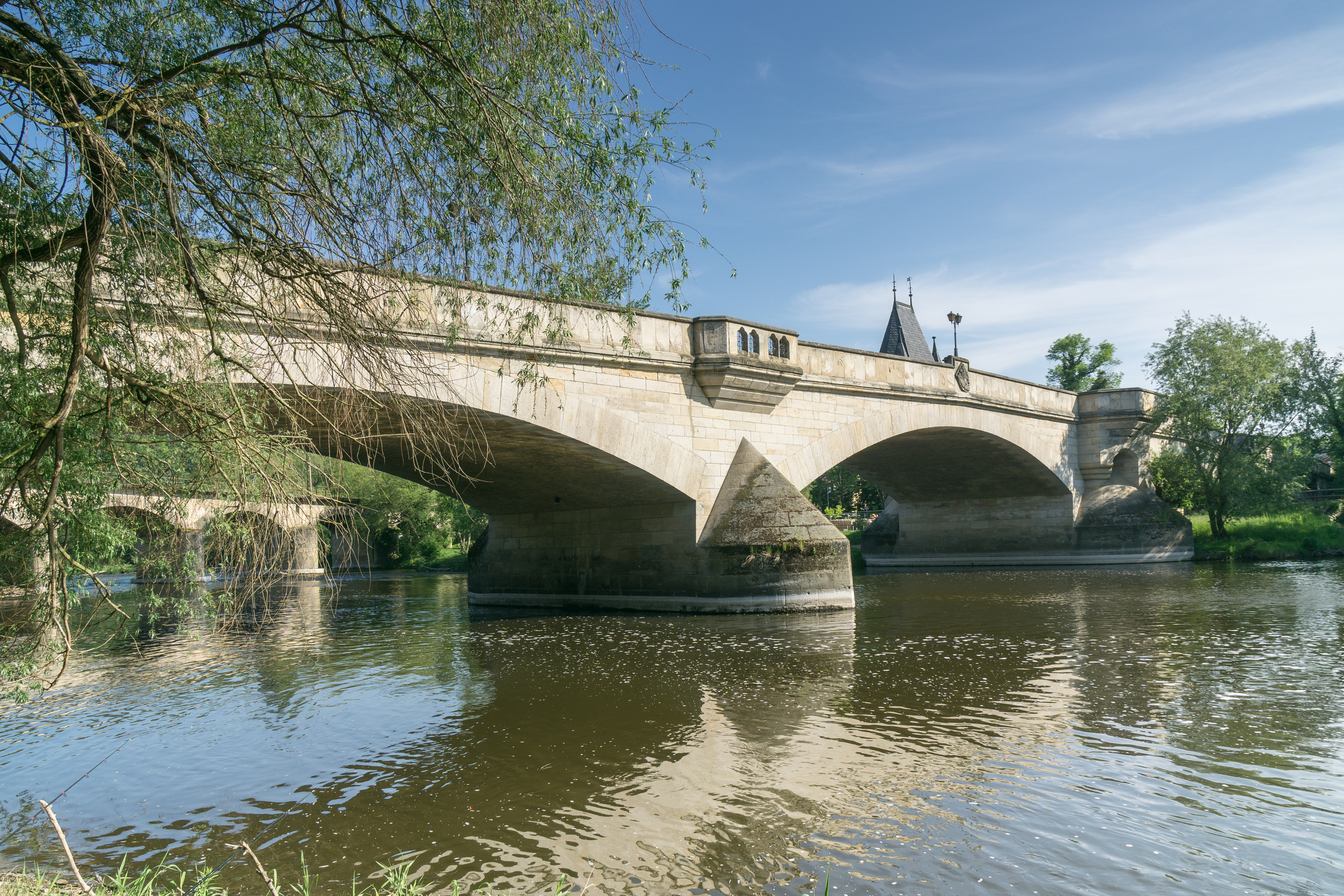 Saalebrücke, Brücke der Einheit, Naumburger Straße in Naumburg OT Bad Kösen